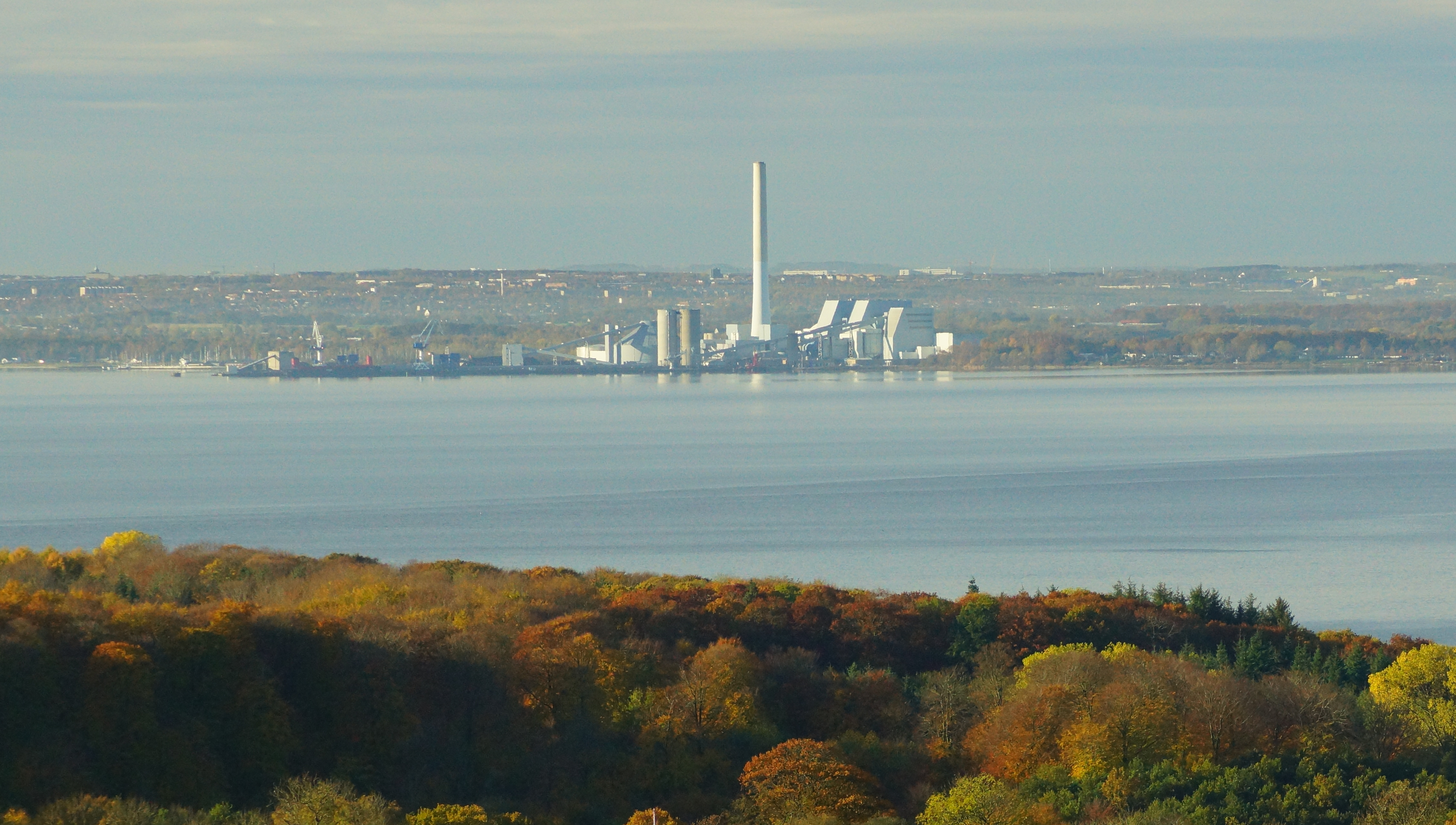 Studstrupværket set hen over Århus Bugt fra toppen Rønde og Hestehave Skov